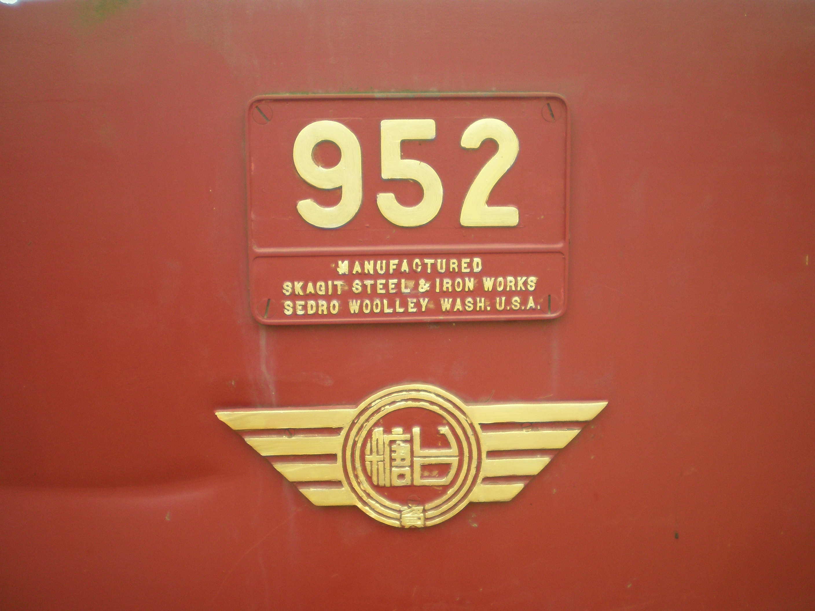 952號金馬牌內燃機車的號碼牌和製造銘板